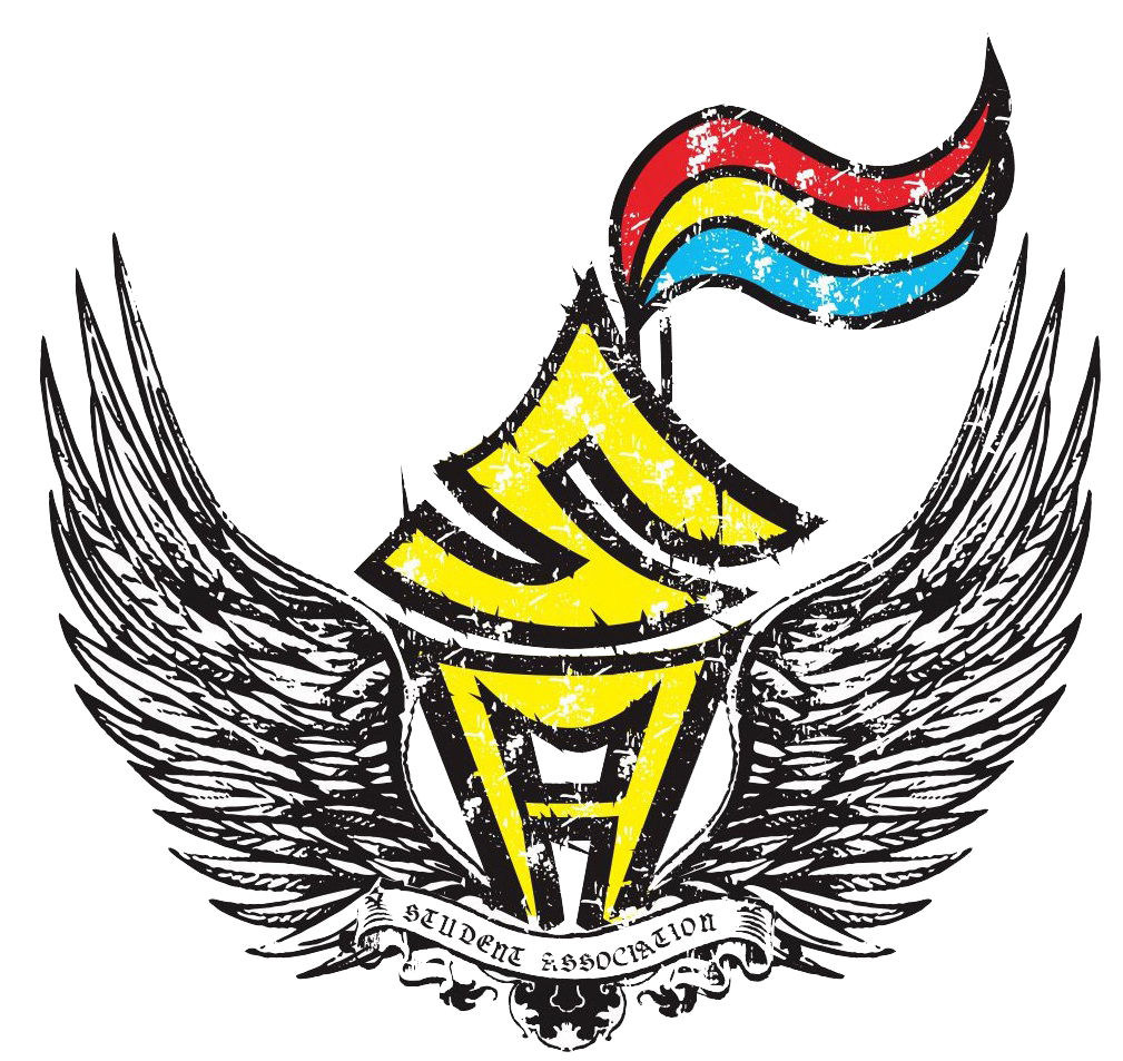 中文（台灣）: 明新科技大學學生會徽章。